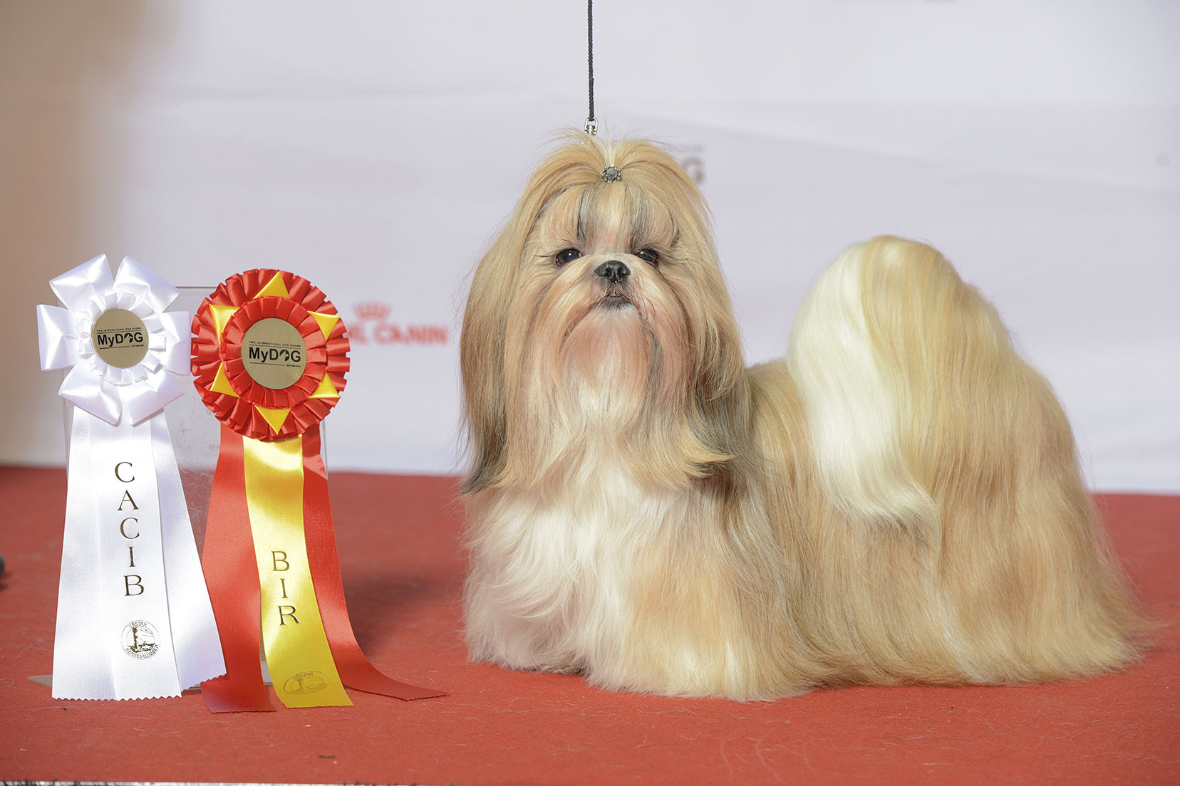 Grupp 9, SHIH TZU, SE UCH Yung Lo’s Heartbeat MyDOG, nordens största hundevenemang.